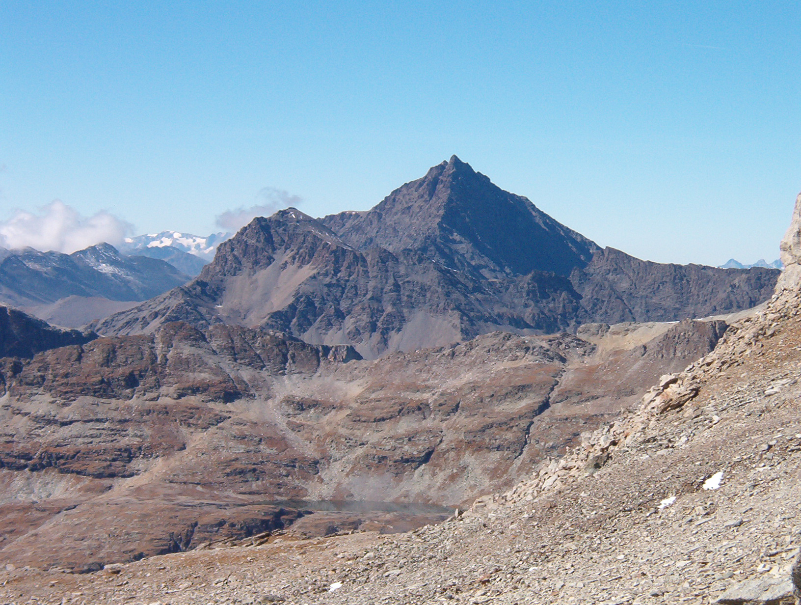 Pierre Menue montagna delle Alpi Cozie - Italia - Francia